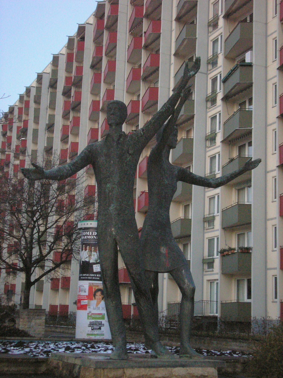 Statue im Erfurter Plattenbaugebiet Johannesplatz aus DDR-Zeiten. Bildhauer: Helmut Braun.